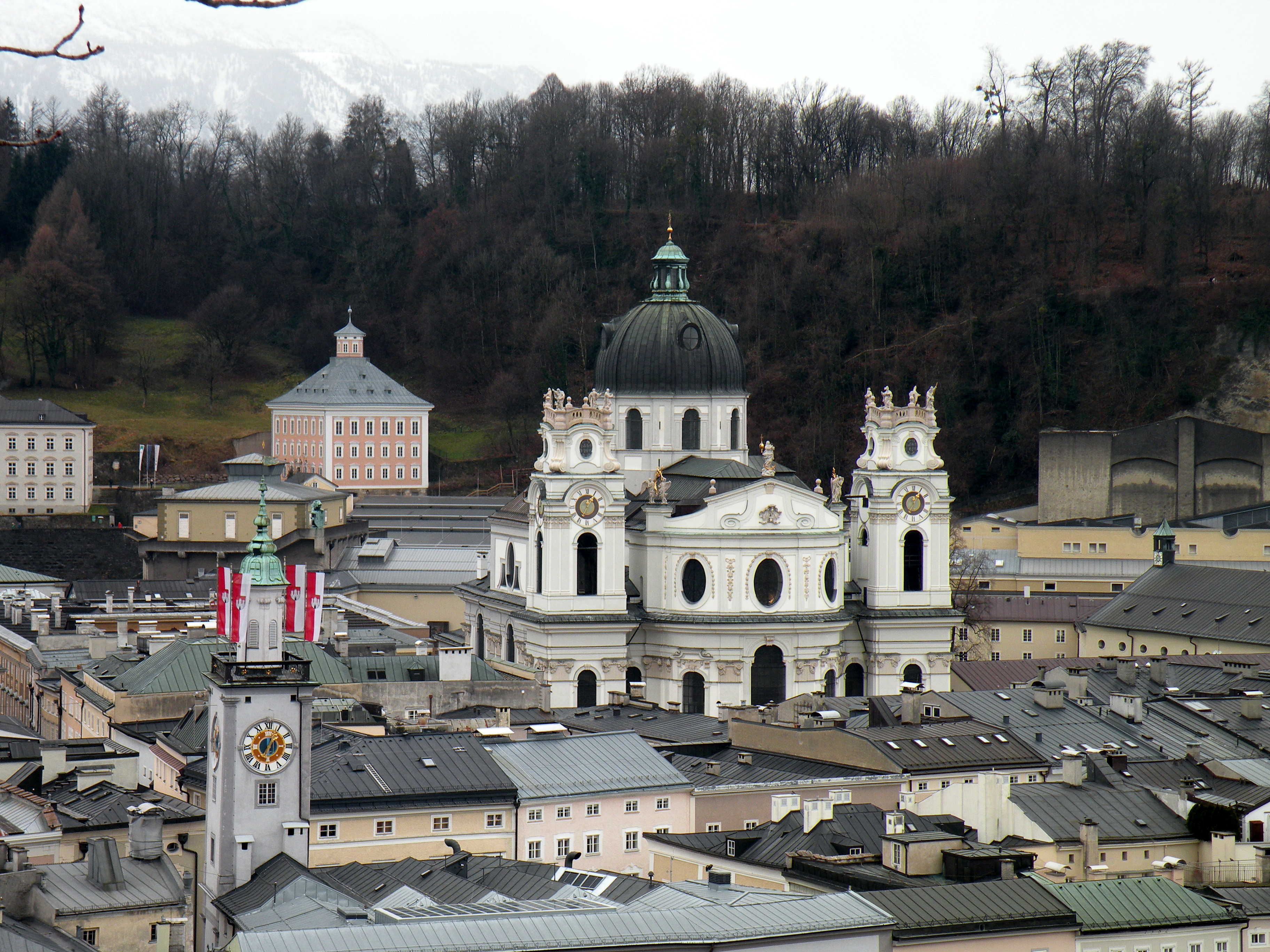 Коллегиенкирхе